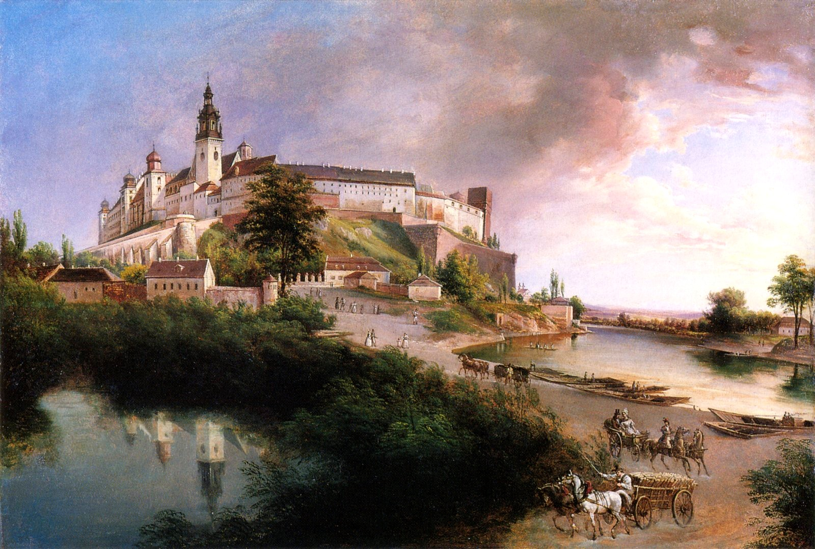 Widok Wawelu od północnego zachodu, Staw na Groblach i przystań flisaków na Wiśle naprzeciw Dębnik Oil on paper glued to canvas, 64.5x99.5 cm, PZS Wawel